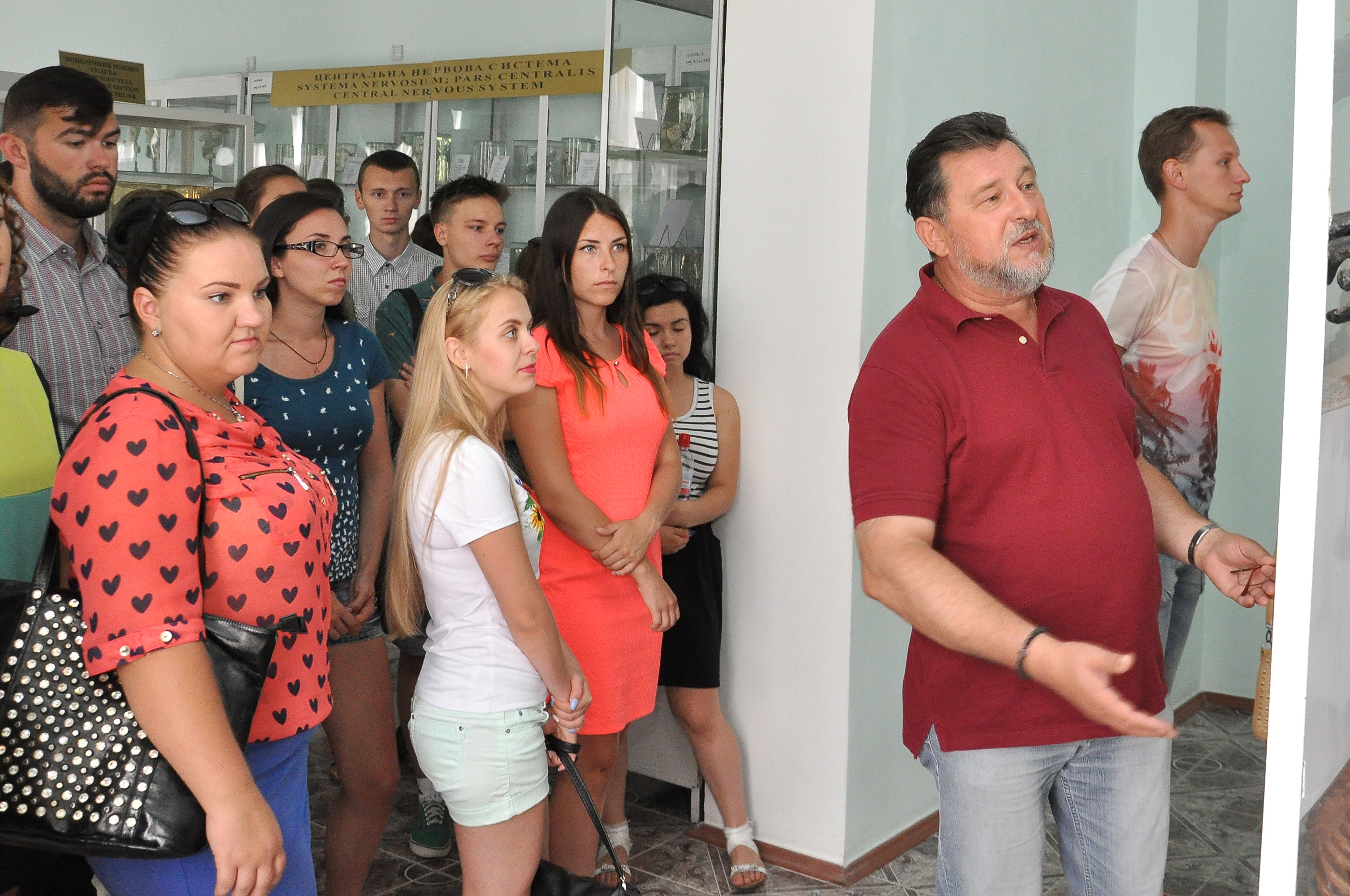 Екскурсія абітурієнтів у Музей анатомії Тернопільського державного медичного університету імені І. Я. Горбачевського.